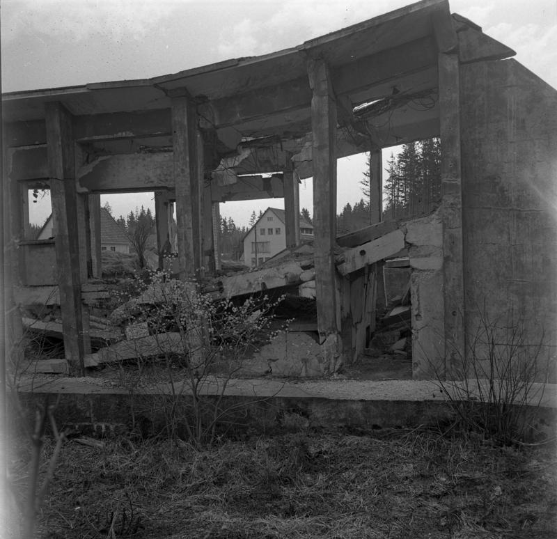 Neu-Gablonz bei Kaufbeuren/Schwaben Gesprengte Bunker, Hallen, letzte Baracken der früheren Munitionsfabrik, auf deren Gelände"Neu-Gablonz" entstand.